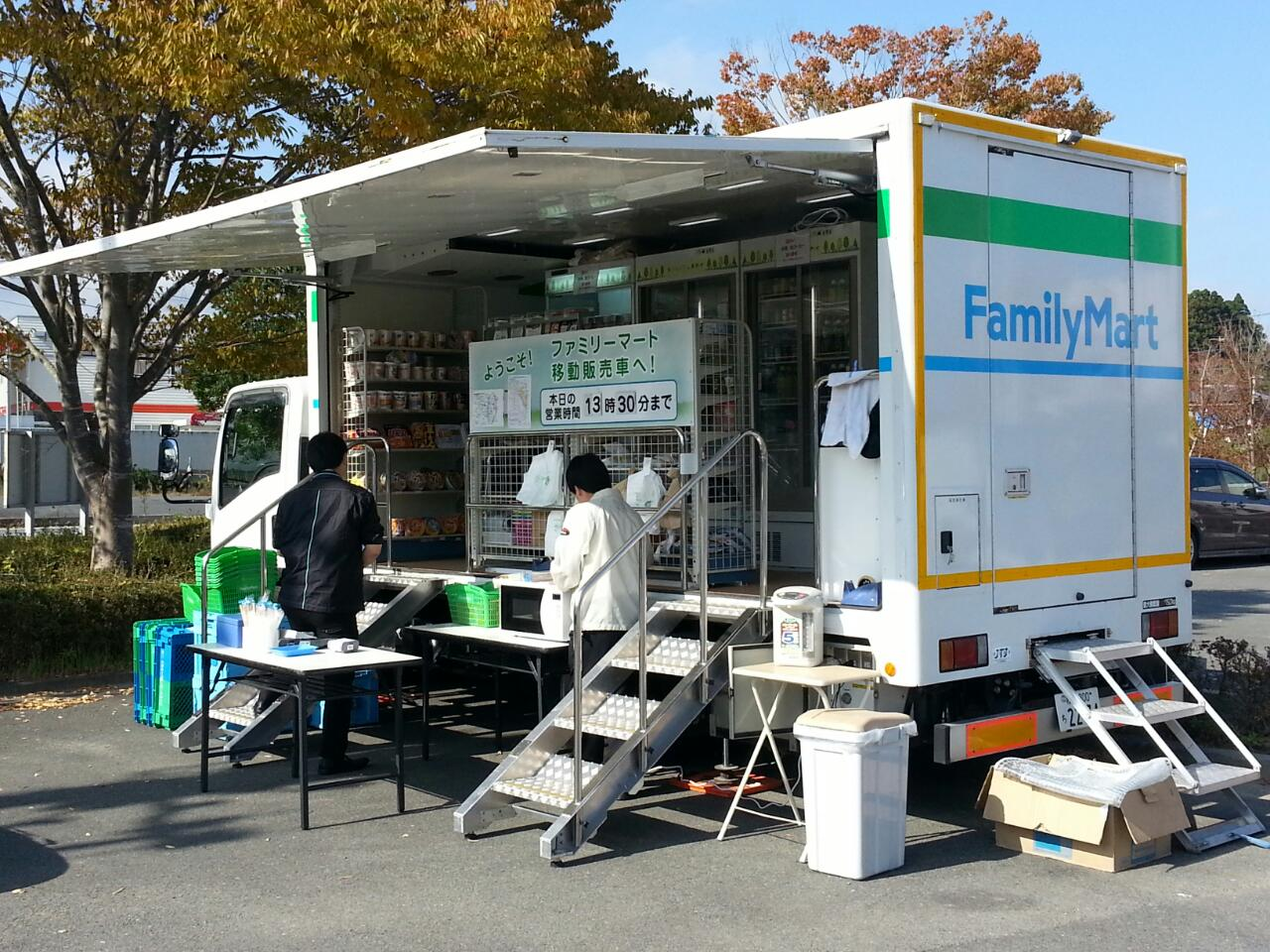 南相馬、小高の移動コンビニ「ファミマ号」。ボランティアの昼休みに冷たい飲み物が買えるってホントうれしい。そんなに売上にならないだろうに。ありがとう。